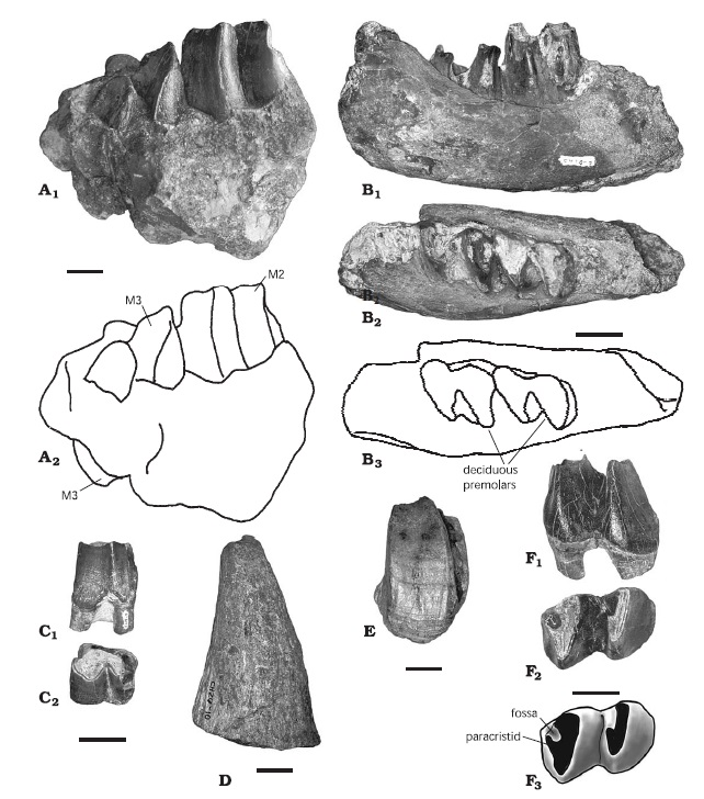 Cranio−dental remains of Arsinoitherium giganteum sp. nov. A. Maxilla fragment with M2−3, CH69−1, holotype, in lateral view; anterior is to the right. (A2, diagram of A1). B. Juvenile dentary with two deciduous premolars, CH10−5, in buccal (B1) and occlusal (B2, B3) views; anterior is to the right. C. Left p4, CH9−9, in buccal (C1) and occlusal (C2) views; anterior is to the left.D. Partial left nasal horn core, CH26−10. E. Left M3 in posterior view, CH3−95. F. Left m2, CH25−17, in buccal (F1) and occlusal (F2, F3) views; anterior is to the left. Scale bars 3 cm.